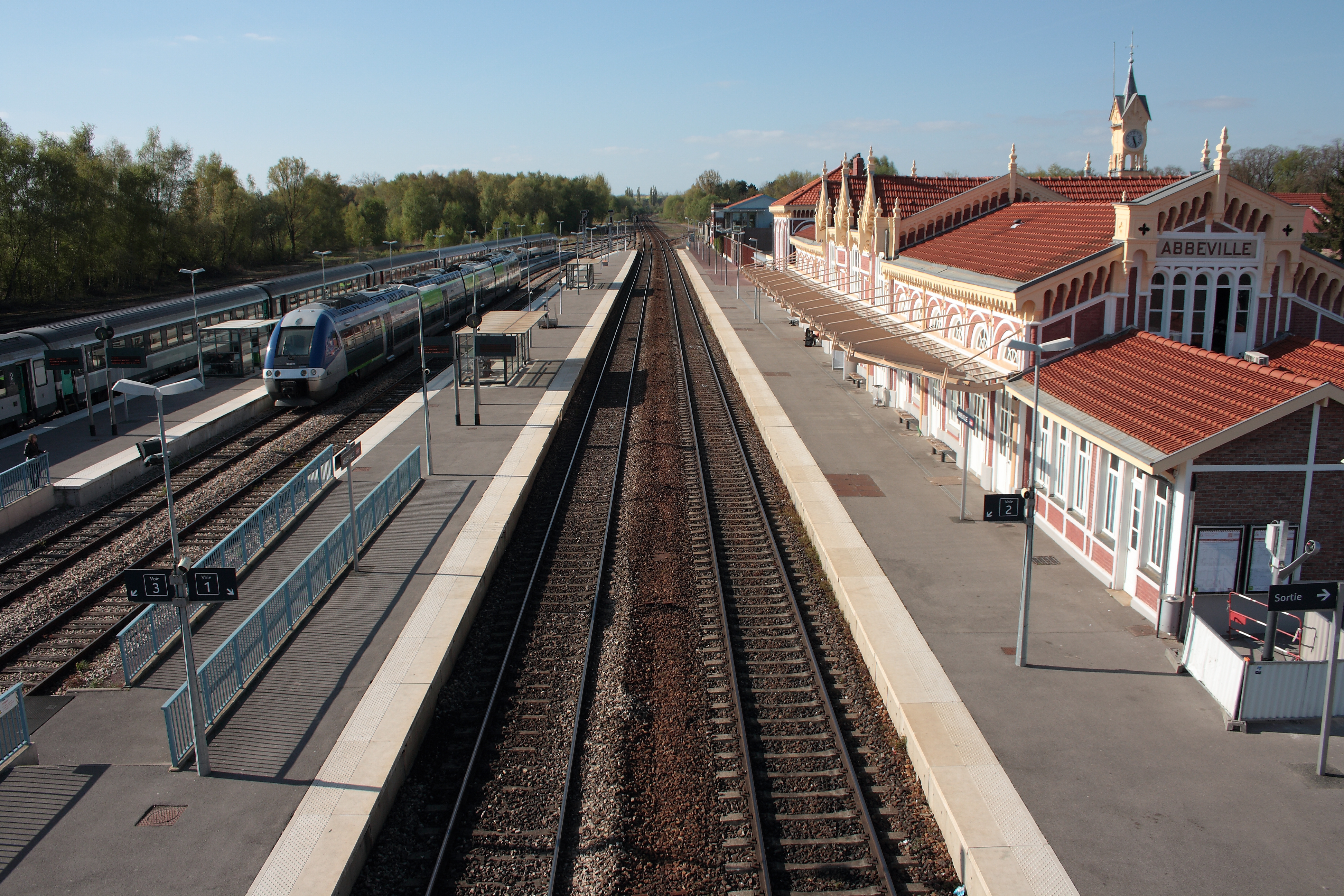 Gare d'Abbeville, après la rénovation de son bâtiment voyageurs dans les années 2010.